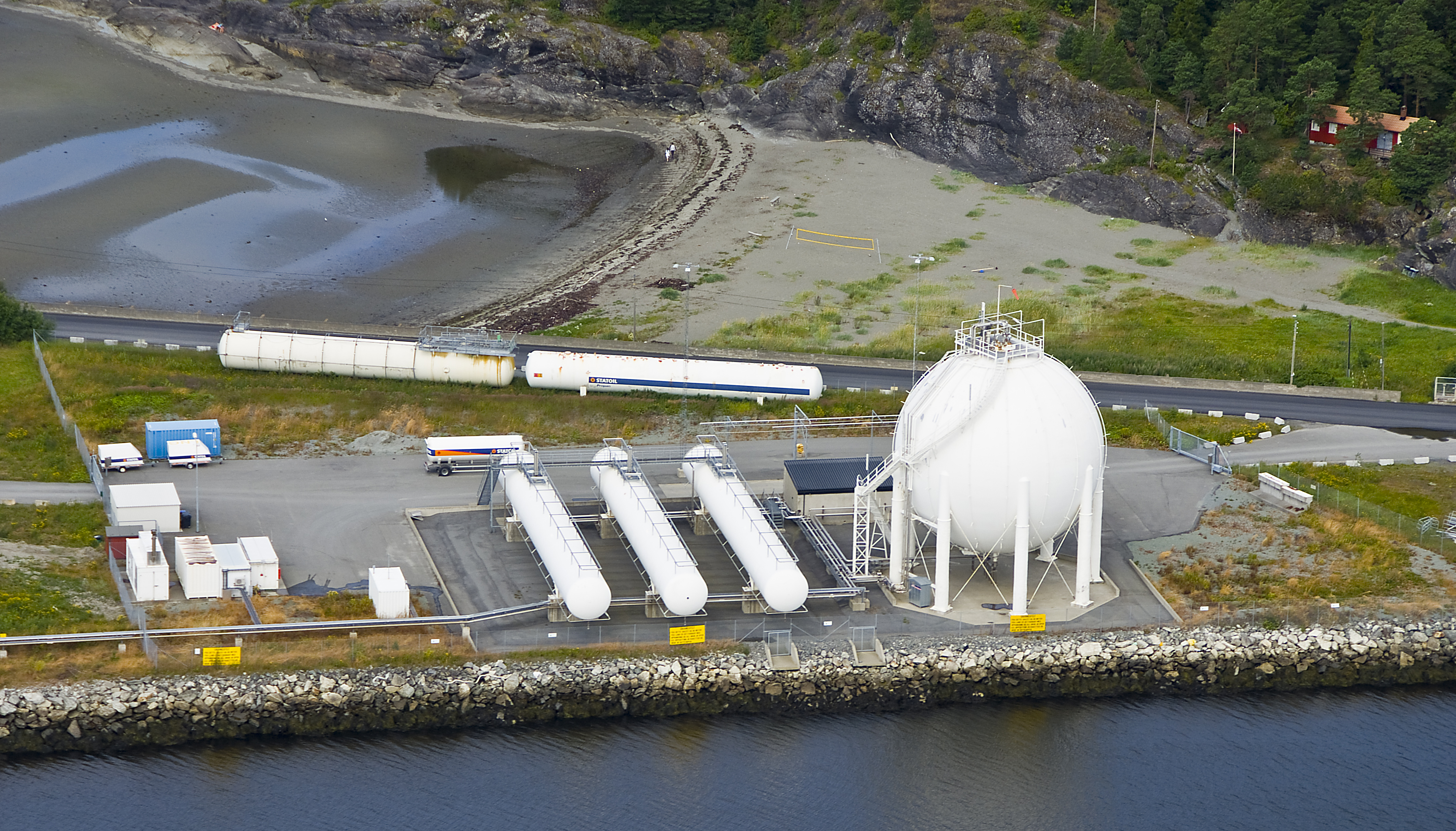 Statoil tar inn gass over kai i Stjørdal havn. Foto: Trondheim Havn/Åge Hojem